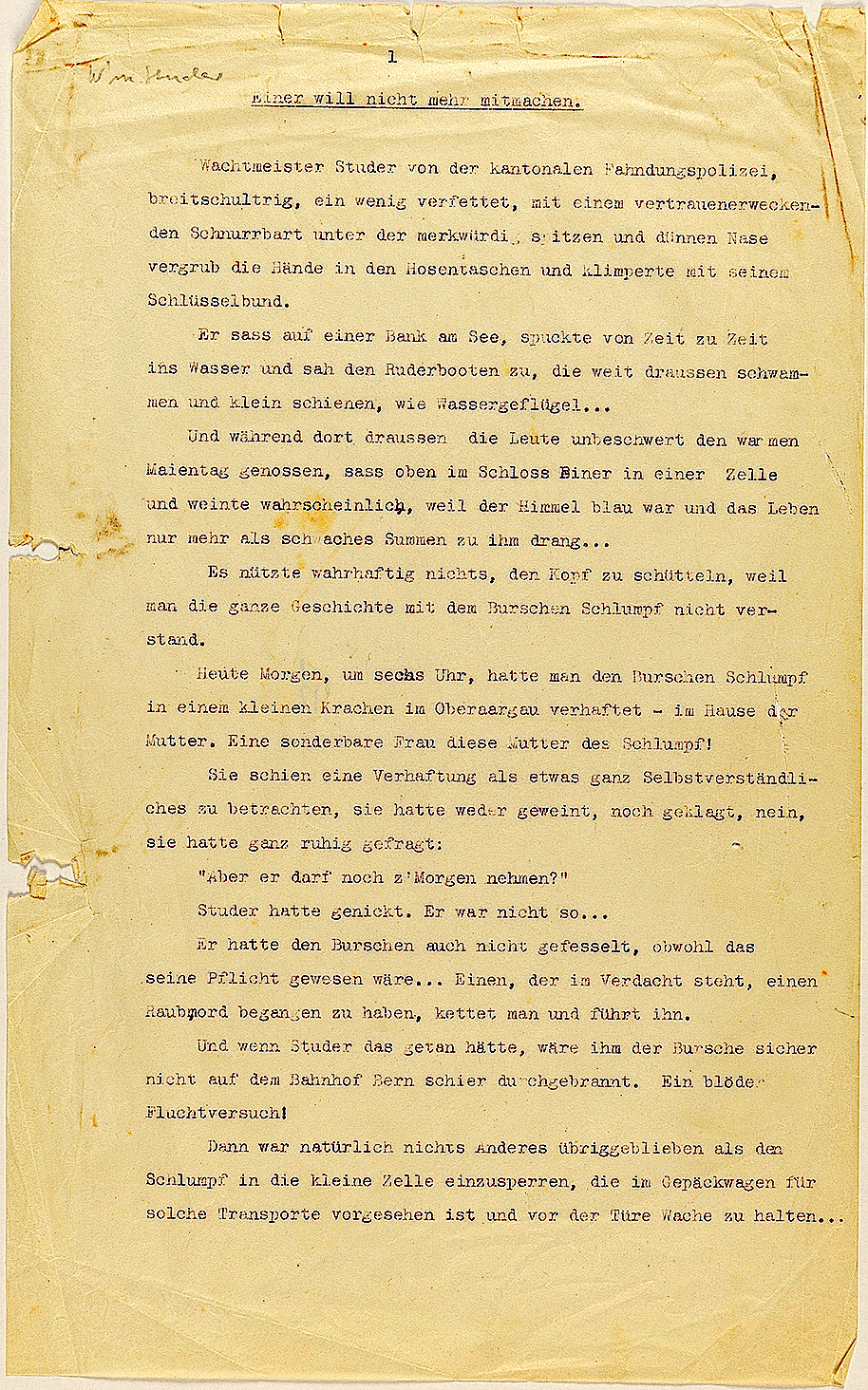 Erste Seite des Typoskrips von Friedrich Glausers "Schlumpf Erwin Mord", 1935